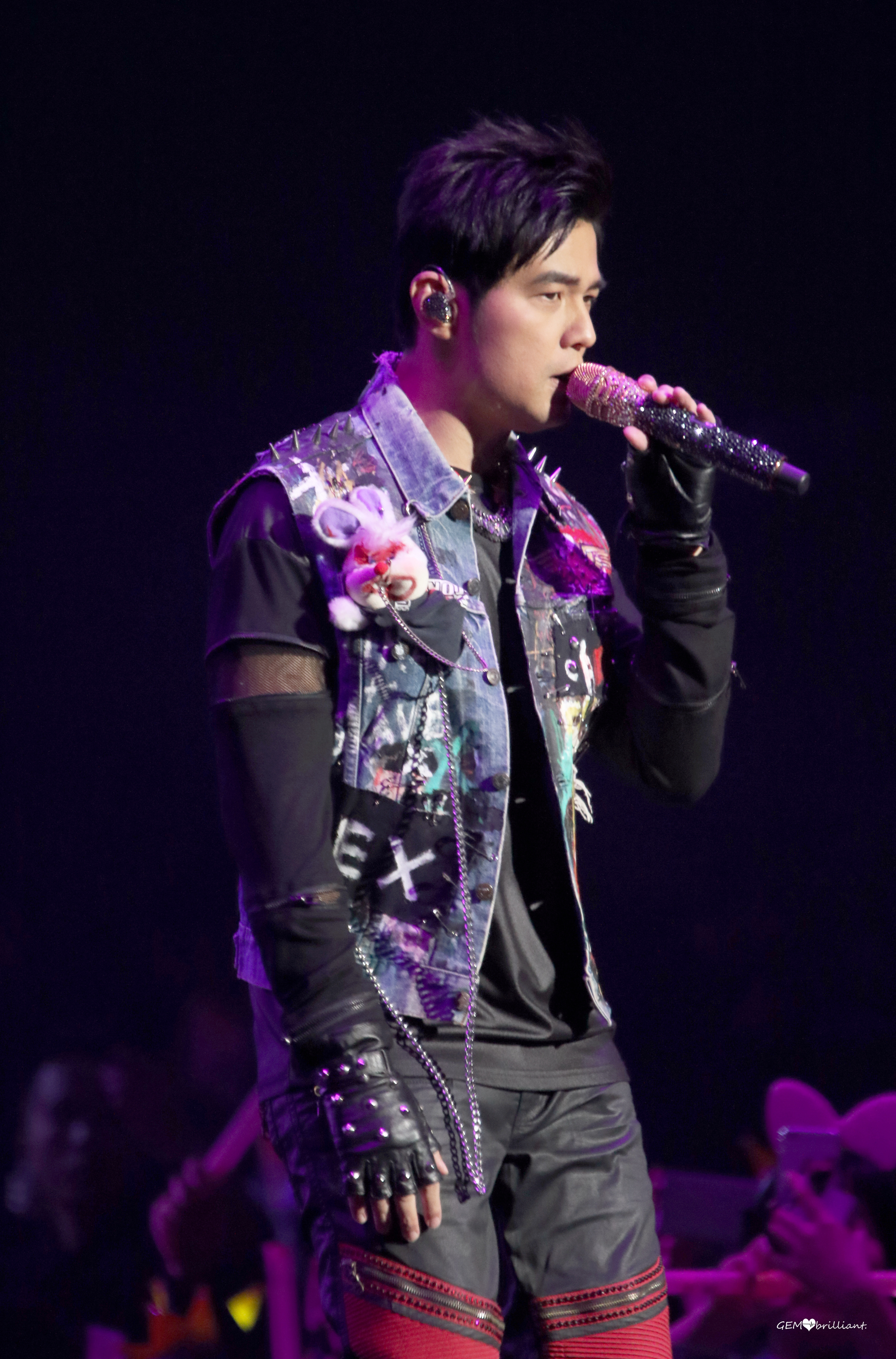 中文（中国大陆）: 20161203 第十届音乐盛典咪咕汇